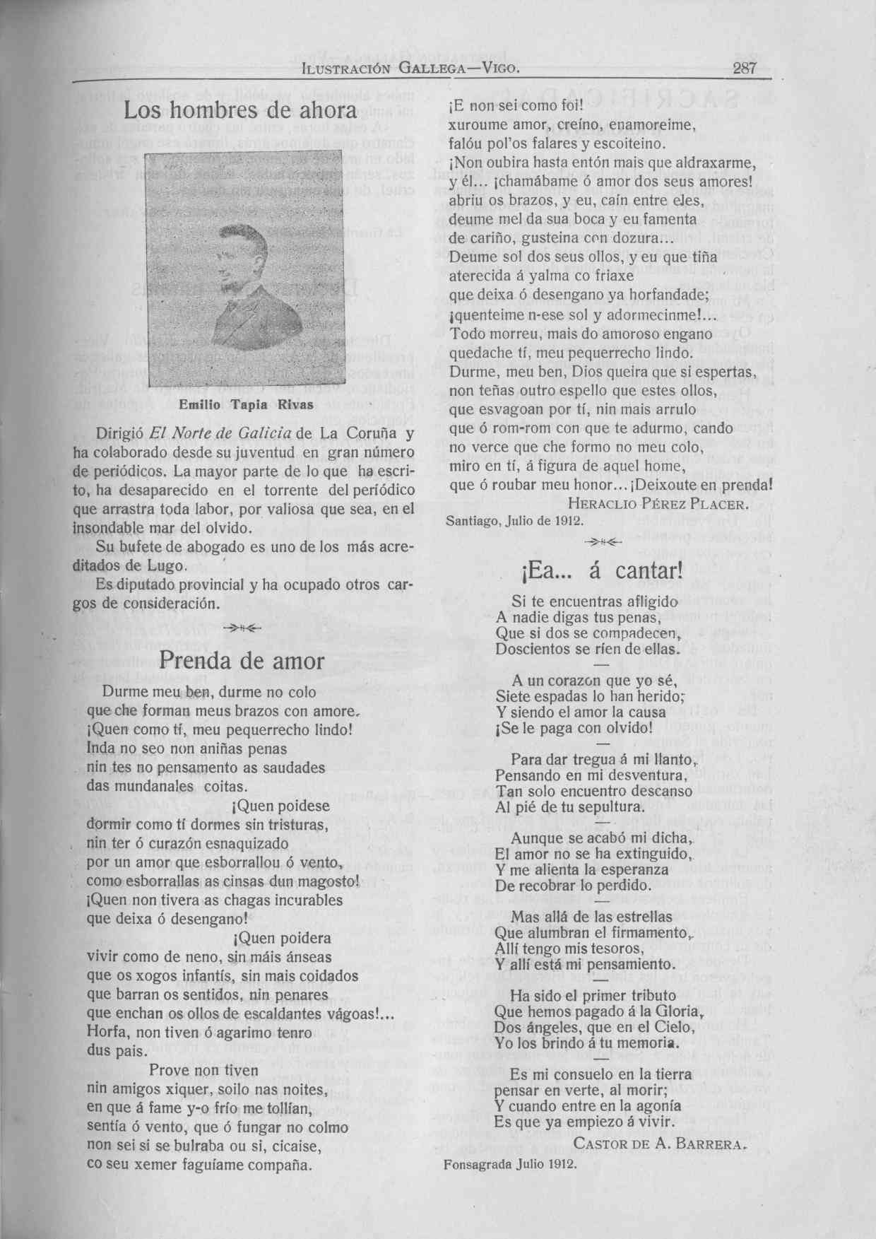 Ilustración Gallega, 10 de julio de 1912, p. 287